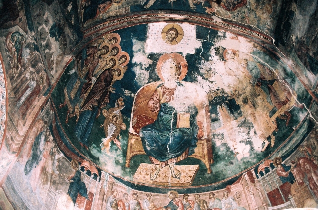 უბისა